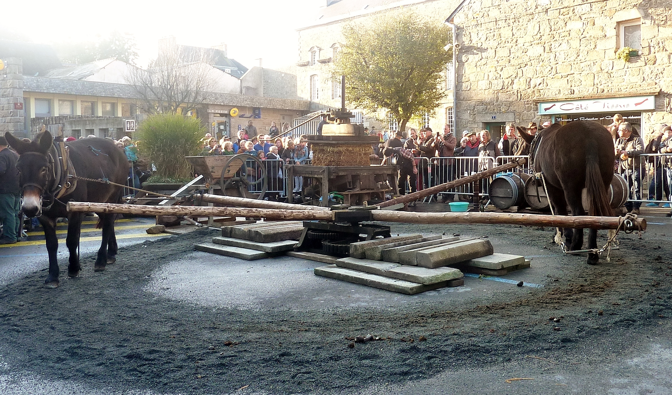 Pressoir à cidre à l'ancienne, actionné par un manège de chevaux (Fête des tisserands de Quintin).